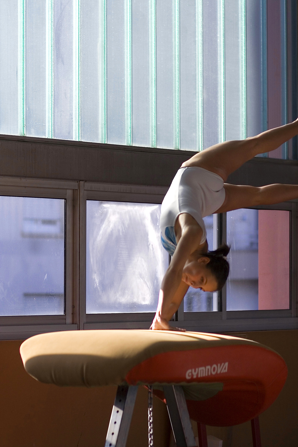 Figure on vault.